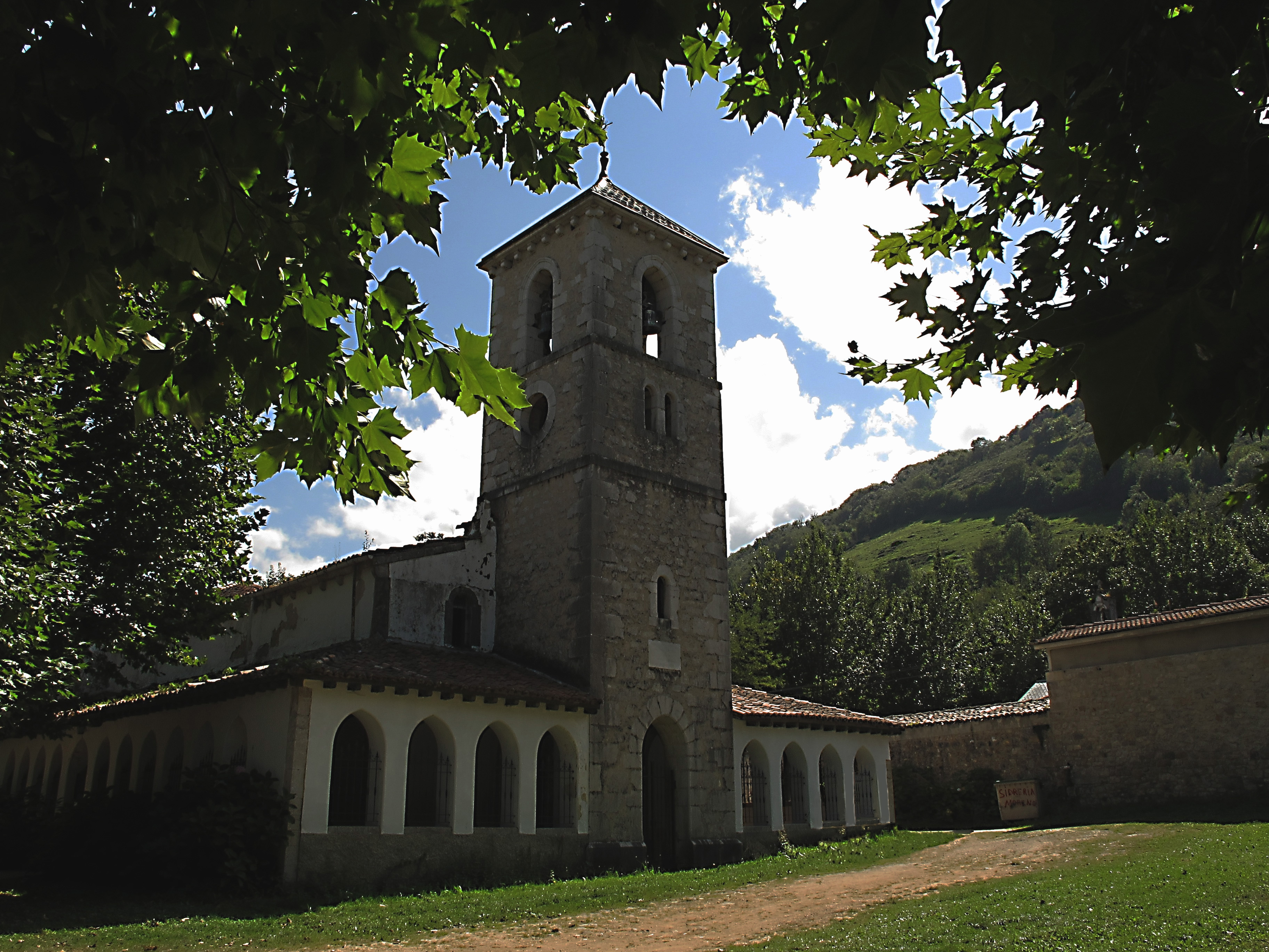 Benia de Onis ( Asturias ) se levanta en el margen izquierda del río Güeña. Se trata de un templo de considerables dimensiones que, ha sufrido grandes reformas, pero conserva interesantes elementos medievales.